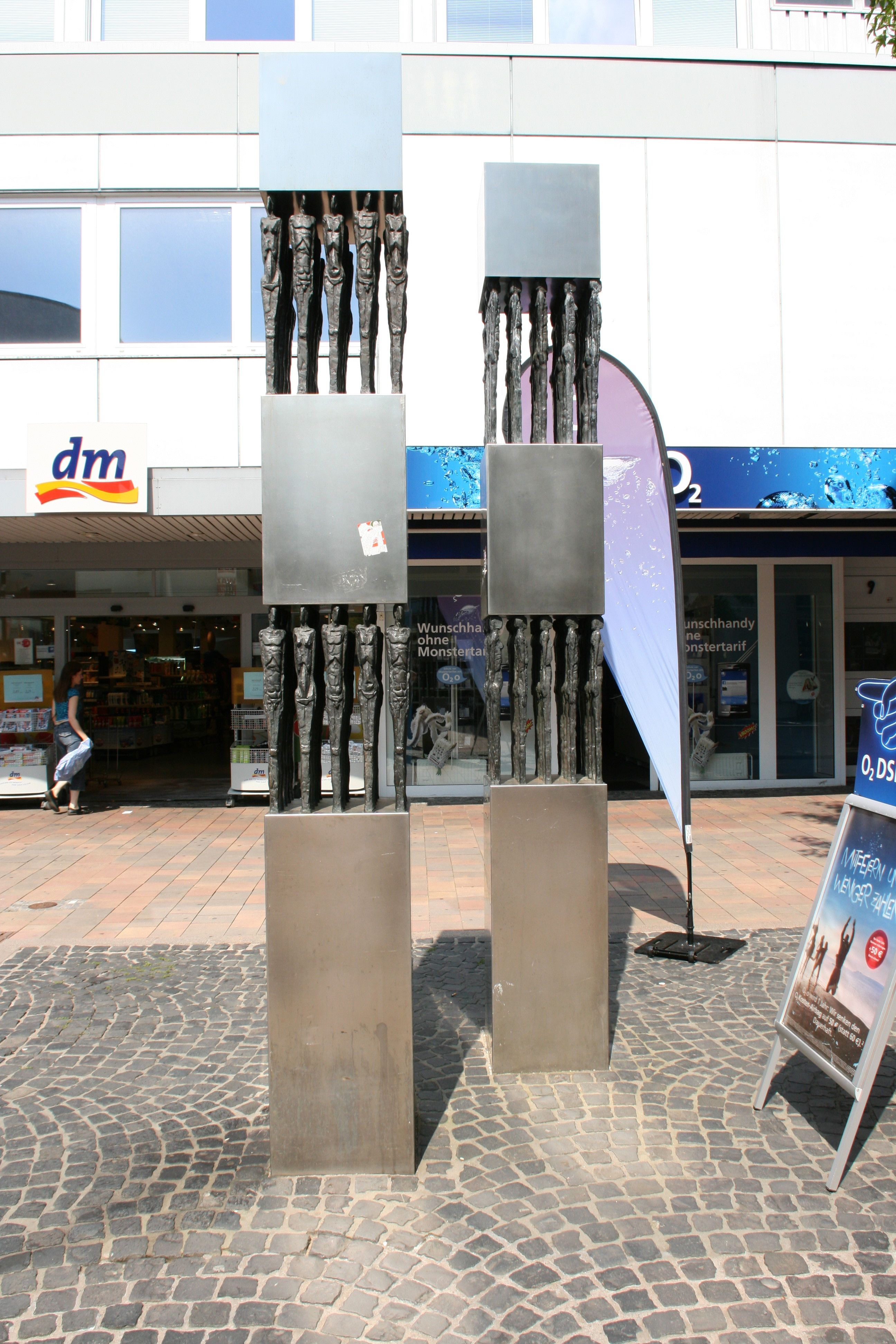 „Miteinander“ von Heinrich Brockmeier, Hermannstraße in Herten